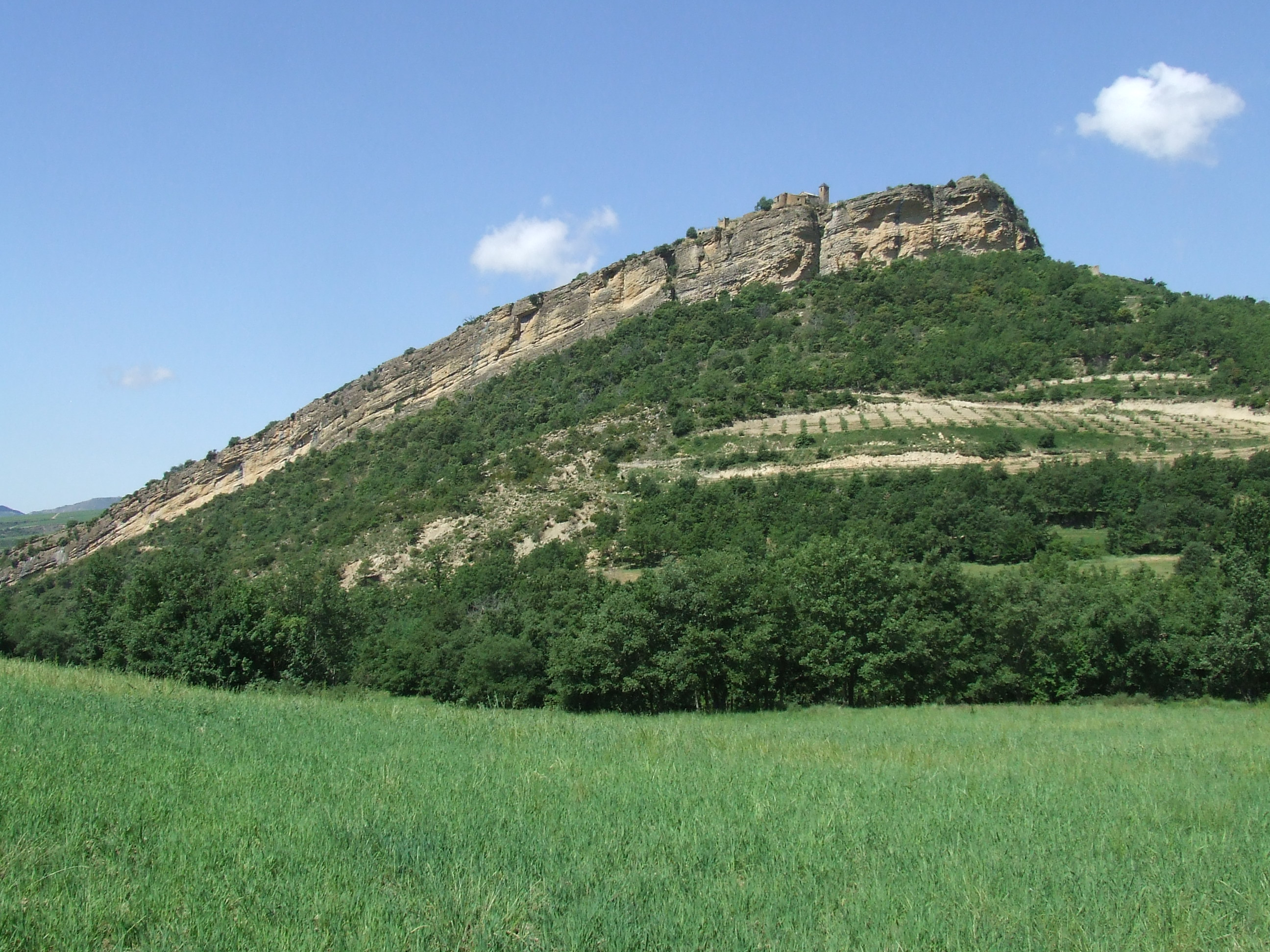 L'espectacular penya-segat del poble de Santa Engràcia (Gurp de la Conca, Tremp, Pallars Jussà)